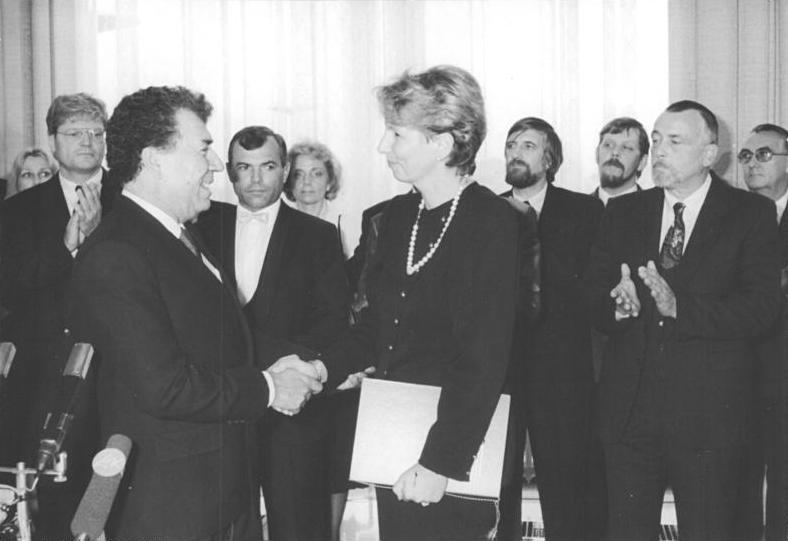 ADN-Klaus Franke-24.9.90 Berlin: Abschiedsempfang Das amtierende DDR-Staatsopberhaupt, Volkskammerpräsidentin Dr. Sabine Bergmann-Pohl, gab in ihrem Amtssitz einen Empfang für das Diplomatische Korps. Damit wurden die in Ost-Berlin akkreditierten Chef diplomatischer Missionen verabschiedet. Hier schütteln sich Dr. Bergmann-Pohl und der Doyen des Diplomatischen Korps, der libanesische Botschafter Joseph Akl, nach beiderseitigen Ansprachen die Hände.